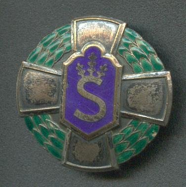 Орден Шюцкора (Охранного корпуса Финляндии) первой степени